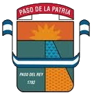 Escudo de Paso de la Patria